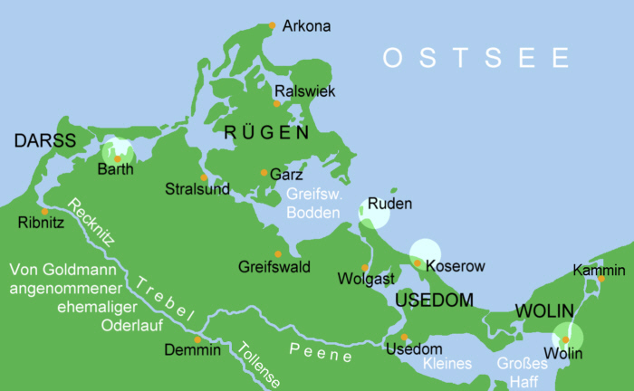 Mögliche Lage von Vineta, Karte